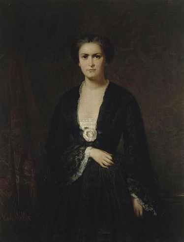 Portrait de Mlle Sophie Cruvelli, de l'Opéra